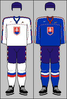 Slovak national team jerseys from Winter Olympic Games 1998 and World Championships 1998-2000